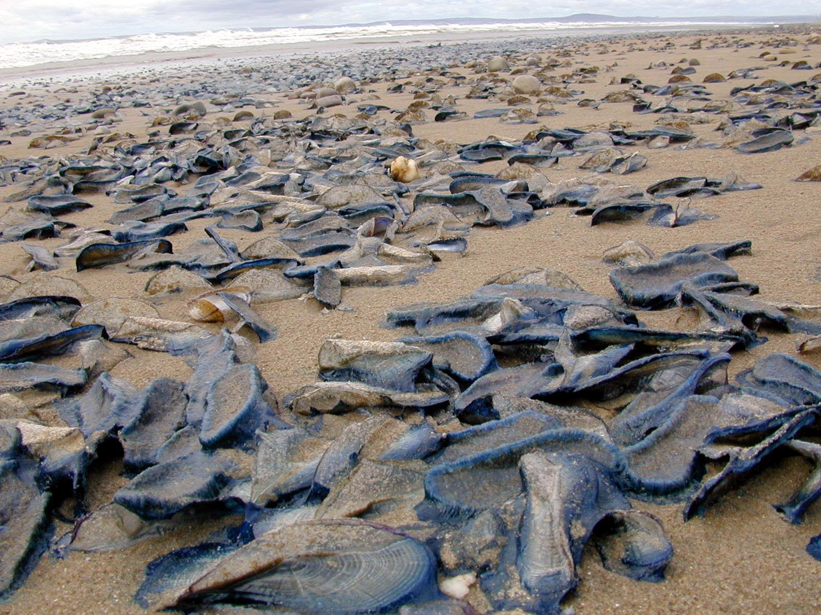 Velella